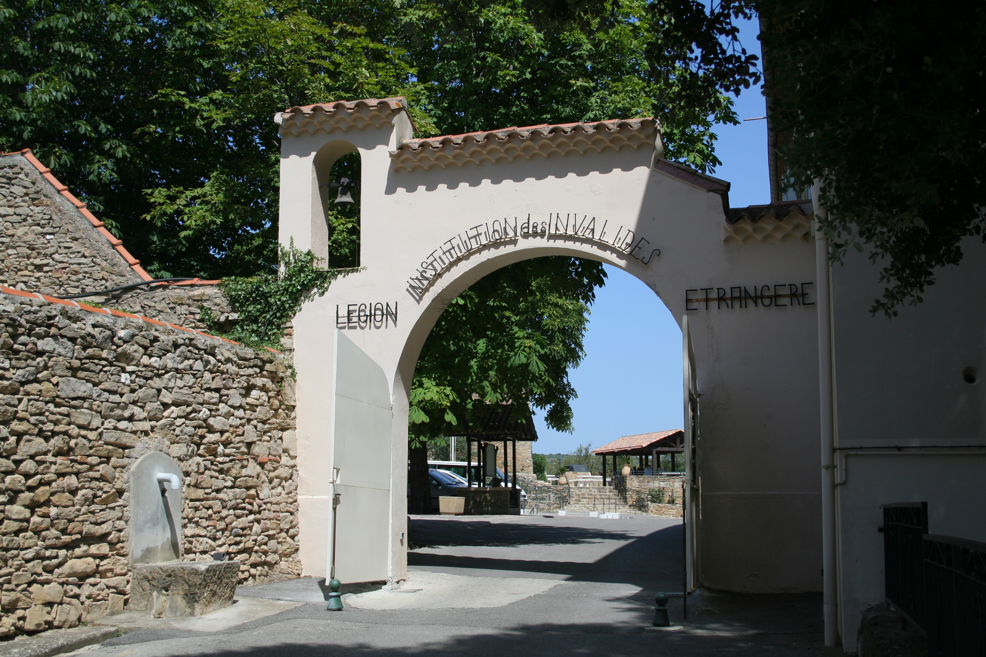 Entrée de l'Institution des invalides de la Légion étrangère à Puyloubier (Bouches du Rhône - France).